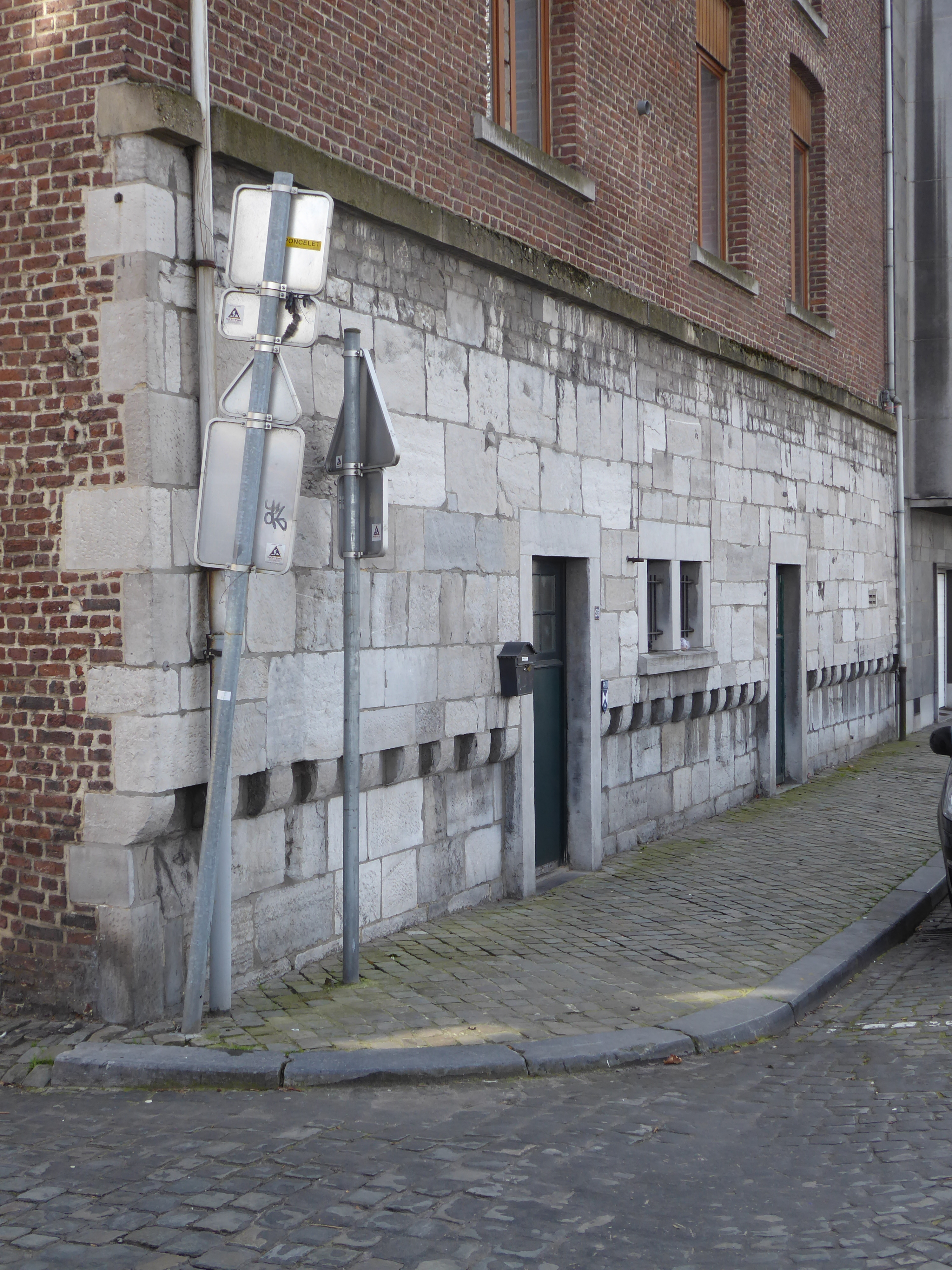 Portion de muraille (probablement du 16ème siècle) réemployeé comme soubassement de deux bâtiments du Quai Sainte Barbe, de part et d'autre de la Place Sainte-Barbe.